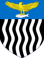 Wapen van Noord-Rhodesië (het huidige Zambia) uit 1927. Uitgeknipt uit 1.